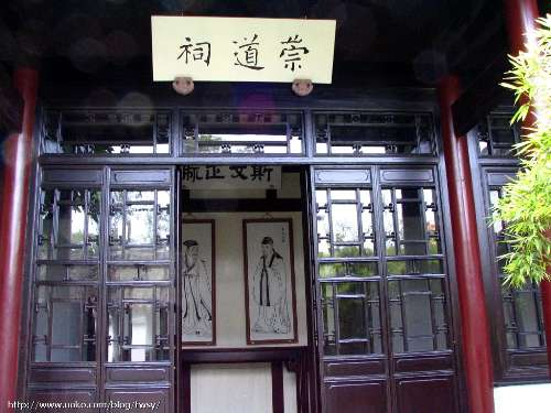 中文（中国大陆）: 崇道祠